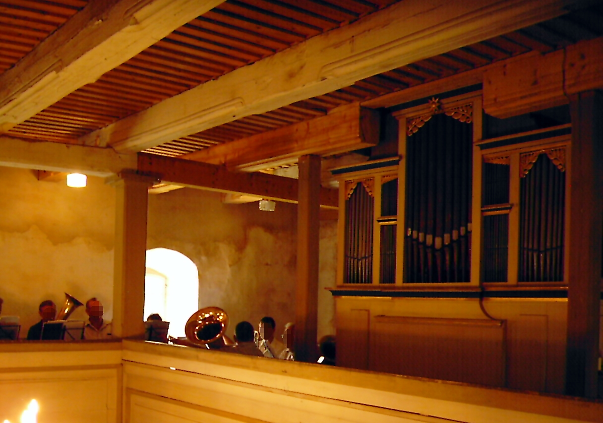 Sauer-Orgel Opus 1503, St. Nicolai Andreas, Biegen, Brandenburg